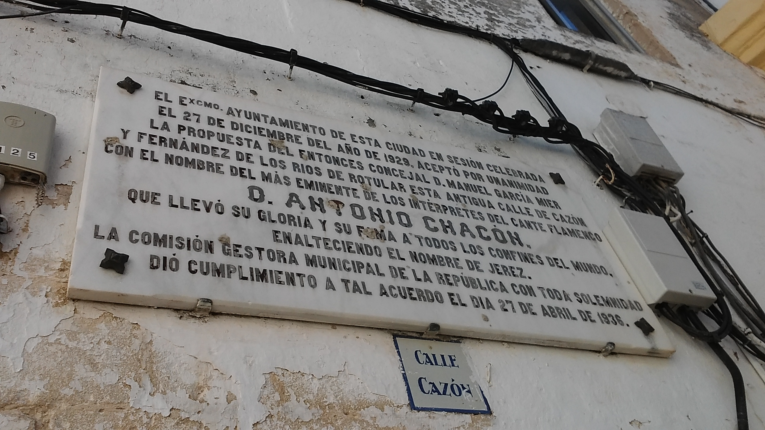 Placa en honor a Don Antonio Chacón (calle cazón, Jerez de la Frontera)